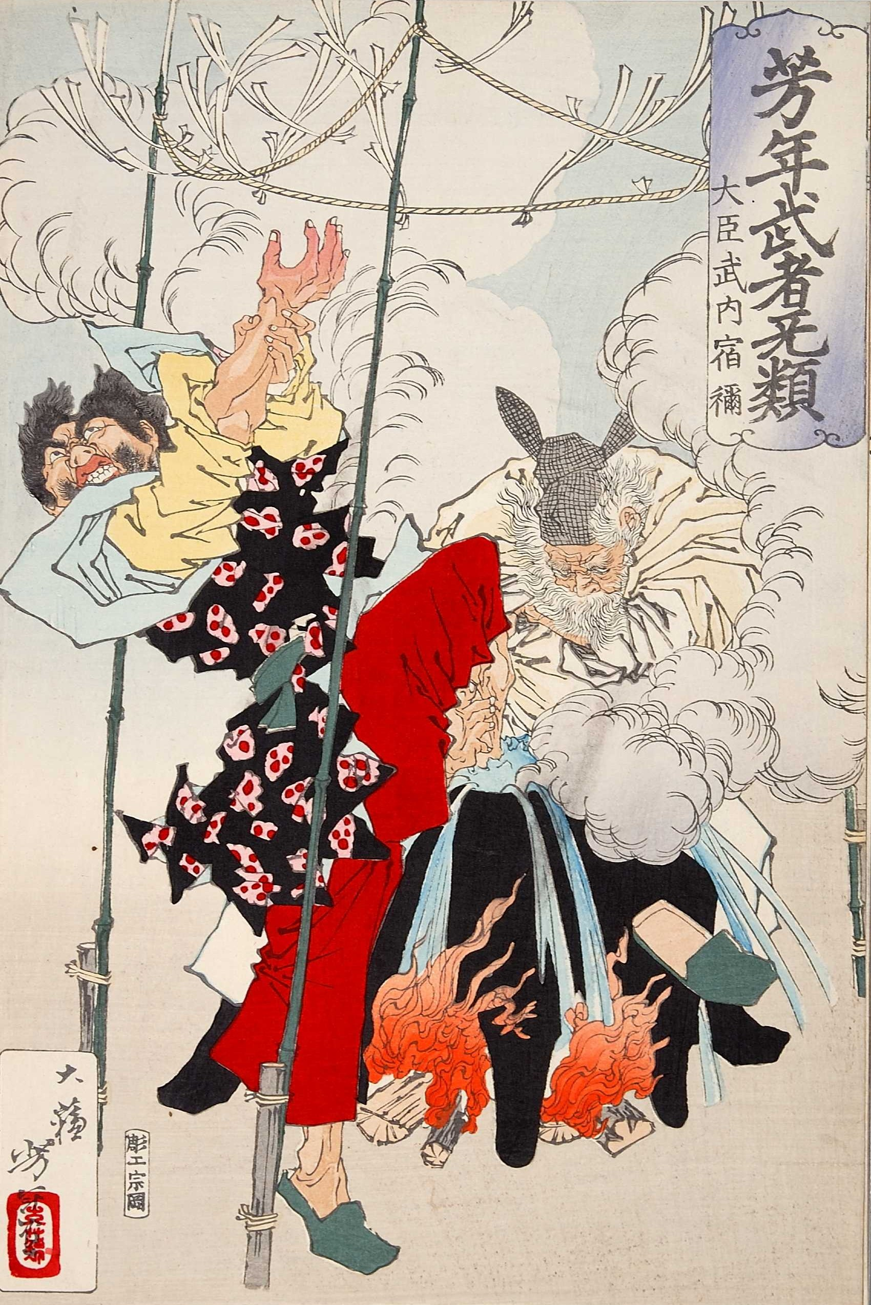 大臣武内宿祢 月岡芳年画「芳年武者无類」